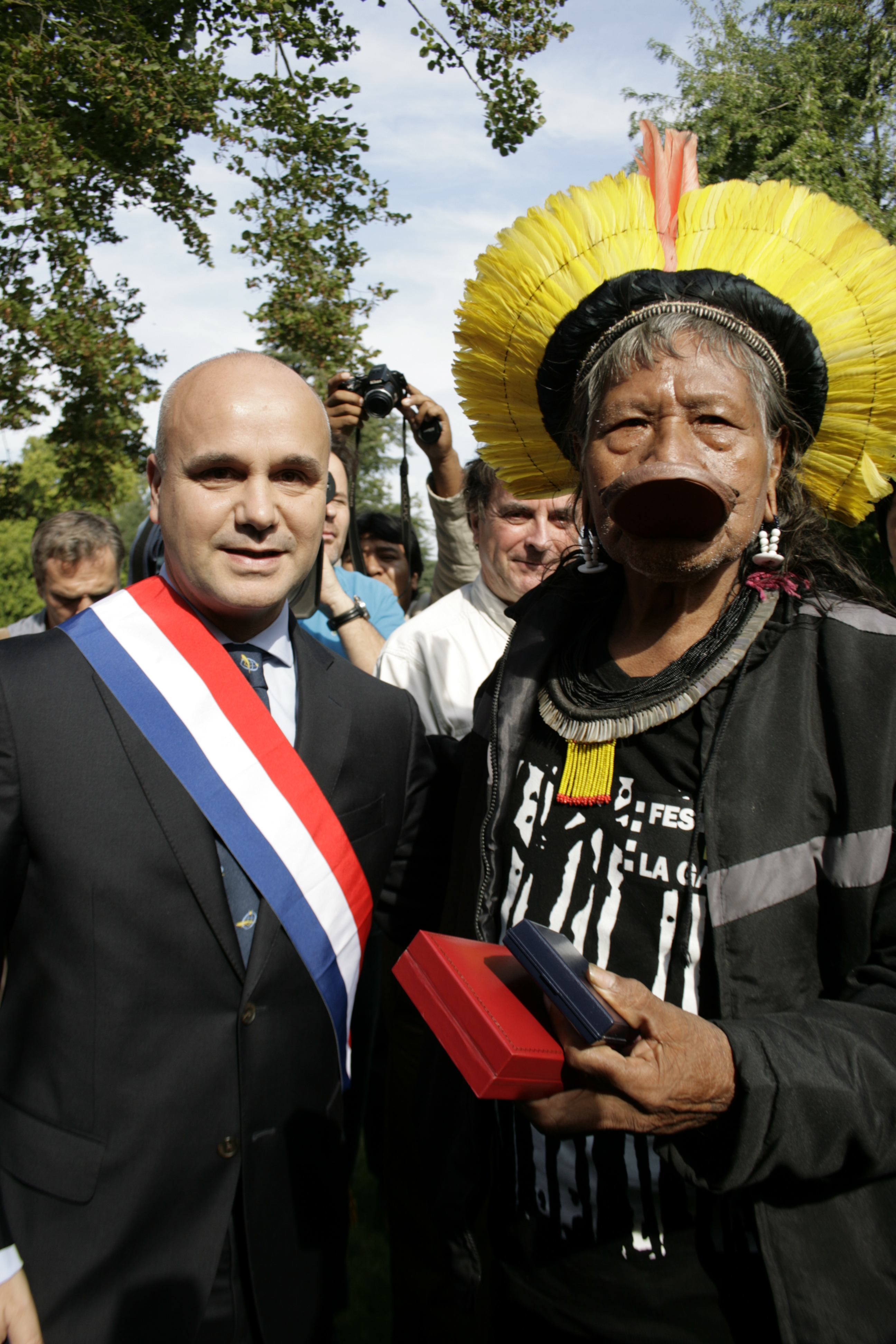 Remise par Nicolas Perruchot de la médaille de l'Assemblée Nationale à Raoni lors de sa venue au Château de Cheverny